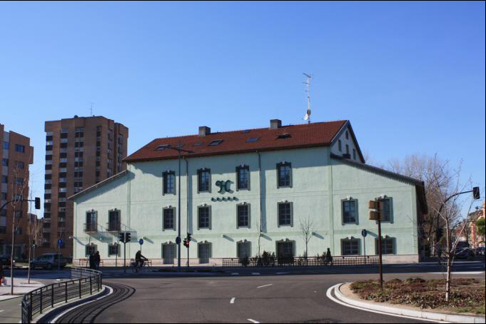 Imagen extraída de la ficha "DST 006 firmado" del Catálogo REVISIÓN DEL PLAN GENERAL DE ORDENACIÓN URBANA DE VALLADOLID